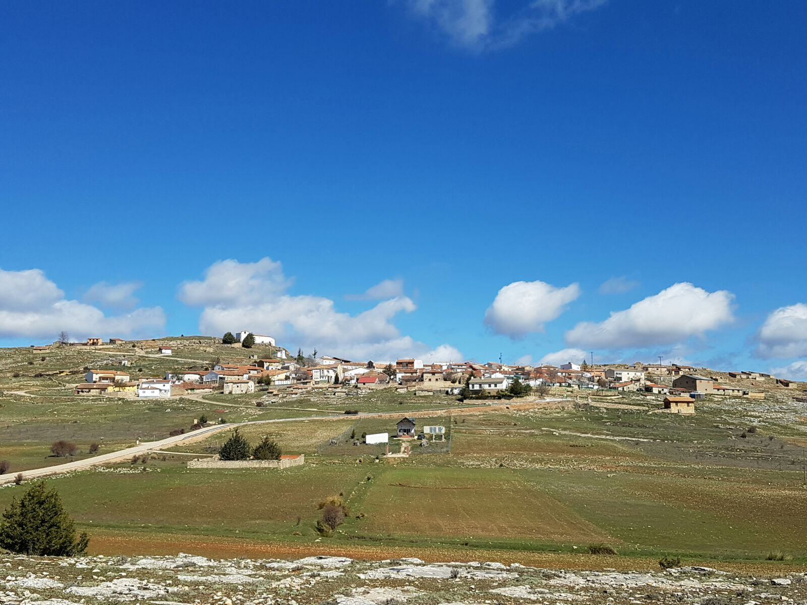 La Cierva, pueblo de Cuenca